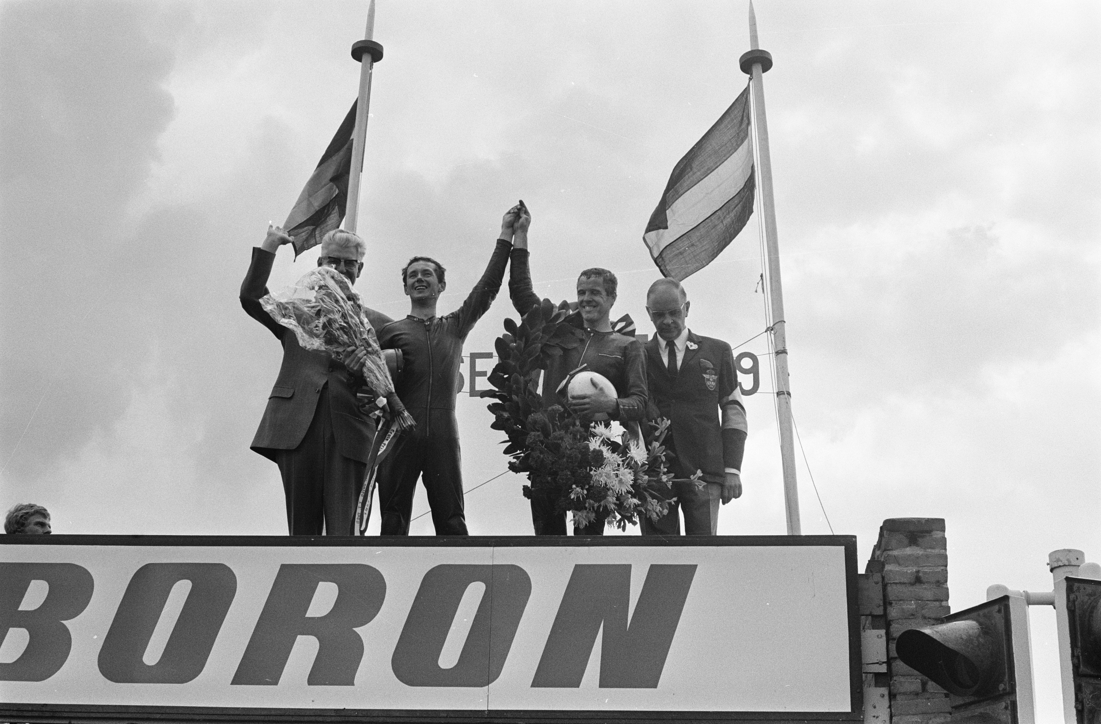 Collectie / Archief : Fotocollectie Anefo Reportage / Serie : TT Assen 1969 Beschrijving : Huldiging van Barry Smith, de winnaar van de 50cc en links Jan de Vries, de beste Nederlander Datum : 28 juni 1969 Locatie : Assen, Drenthe Trefwoorden : huldigingen, kransen, motorcoureurs, motorraces, motorsport, racecircuits Persoonsnaam : Smith, Barry, Vries, Jan de Instellingsnaam : TT Fotograaf : Fotograaf Onbekend / Anefo Auteursrechthebbende : Nationaal Archief Materiaalsoort : Negatief (zwart/wit) Nummer archiefinventaris : bekijk toegang 2.24.01.05 Bestanddeelnummer : 922-5816